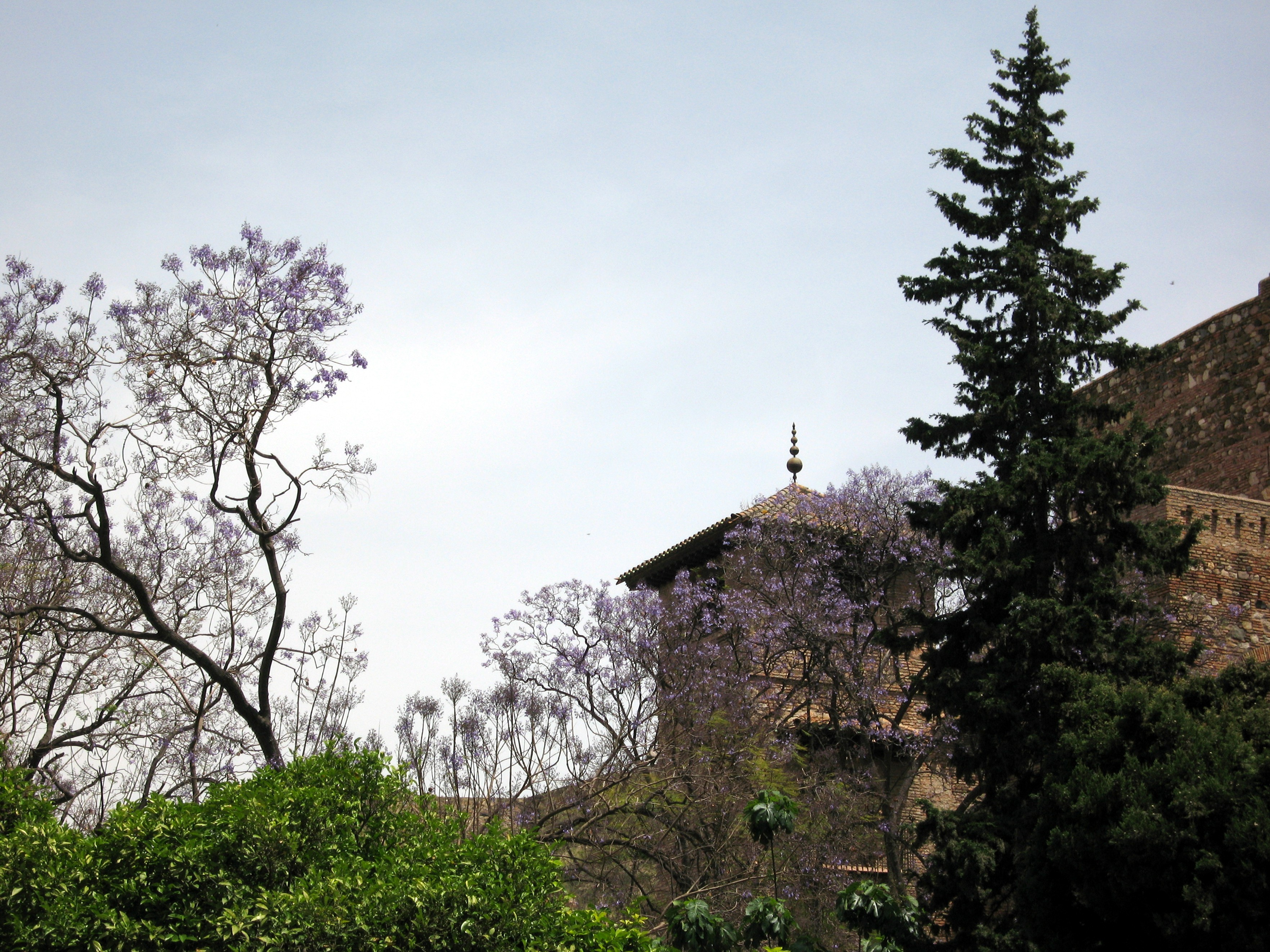 Alcazaba in Málaga, Andalusien, Spanien